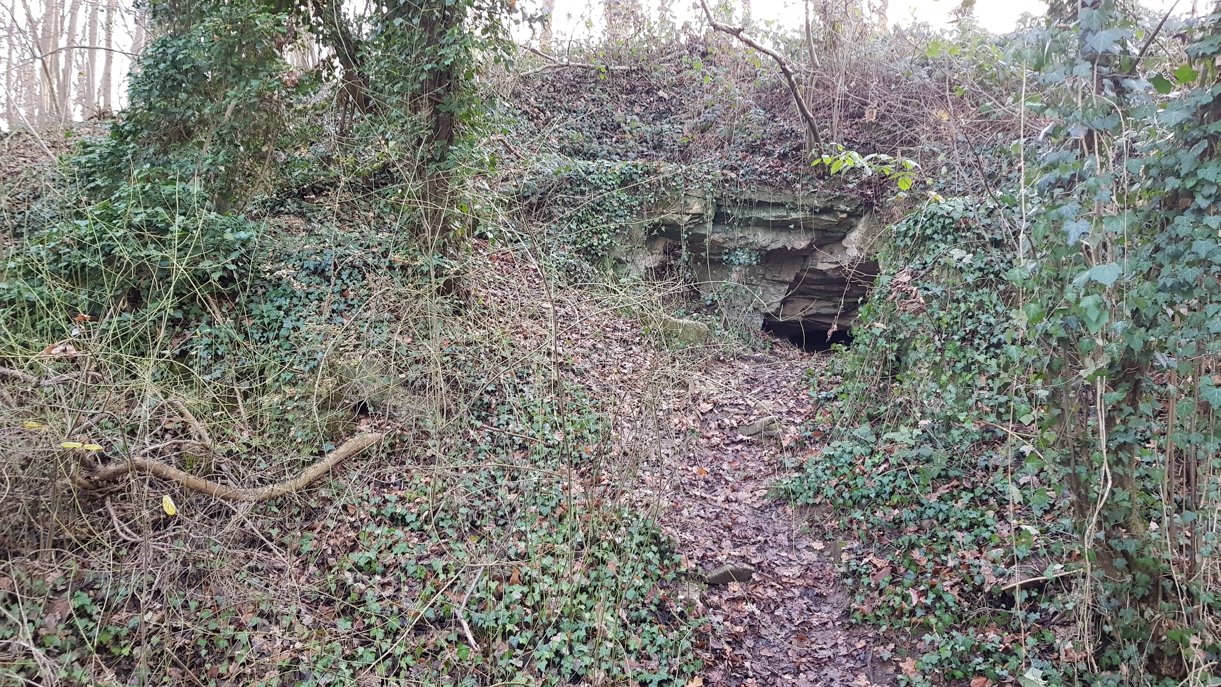 Sint-Jansboschgroeve I, Oud-Valkenburg, Nederland